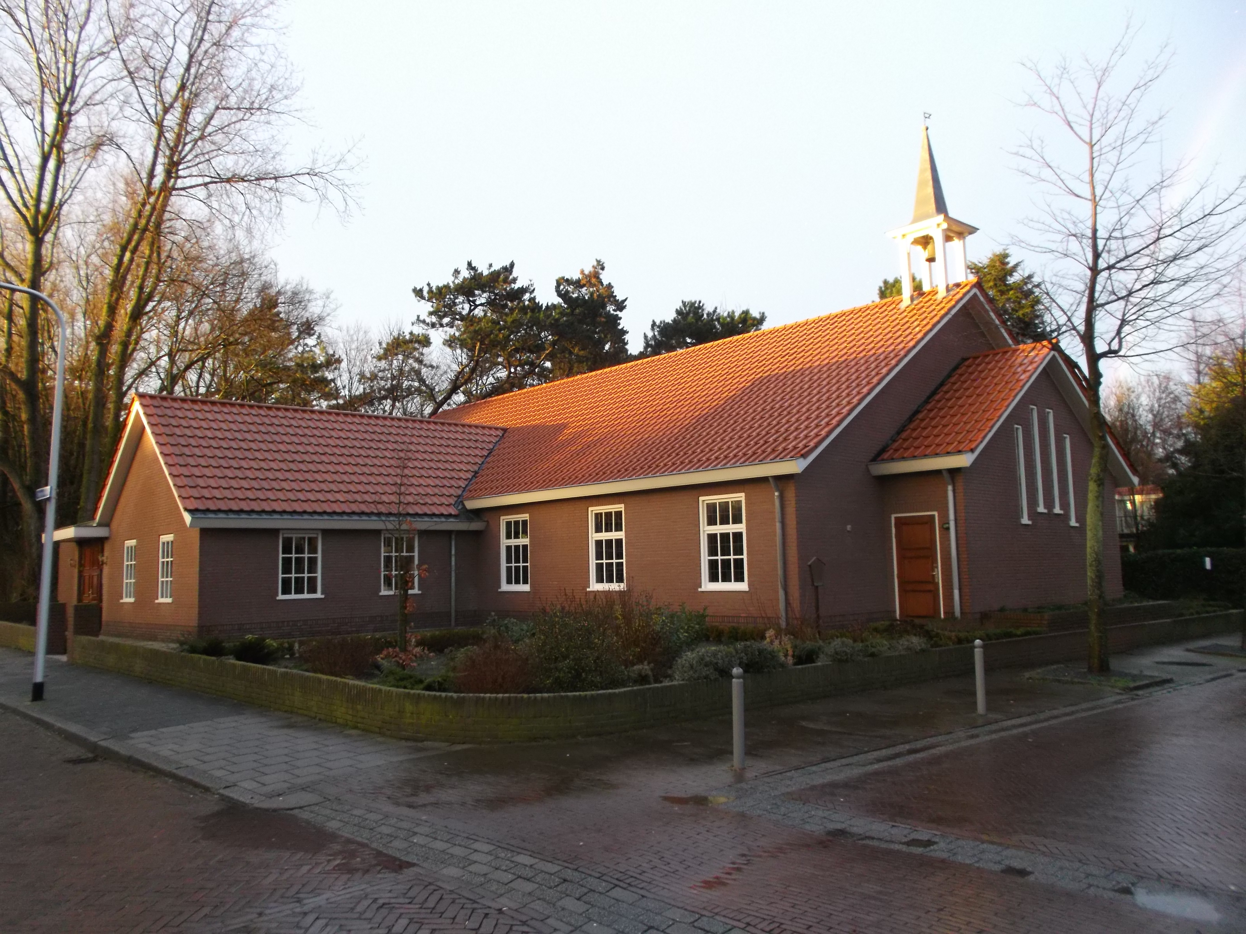 Geref. Kerk vrijgemaakt, Willem de Zwijgerlaan Katwijk.